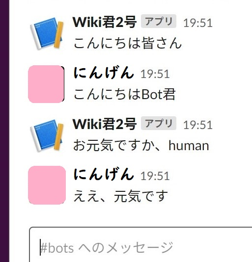 bot user in slack